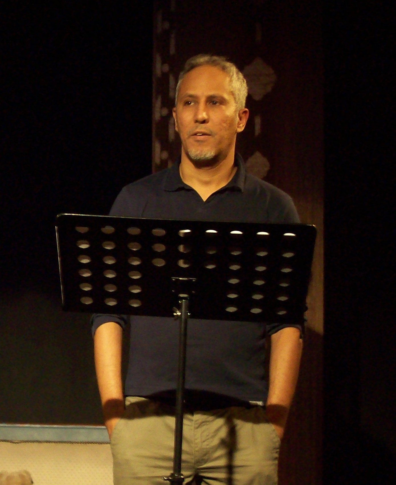 Alessandro Ghebreigziabiher, Spettacolo di teatro narrazione, in occasione dell'uscita del libro Amori diversi, Tempesta editore, Teatro Planet, Roma